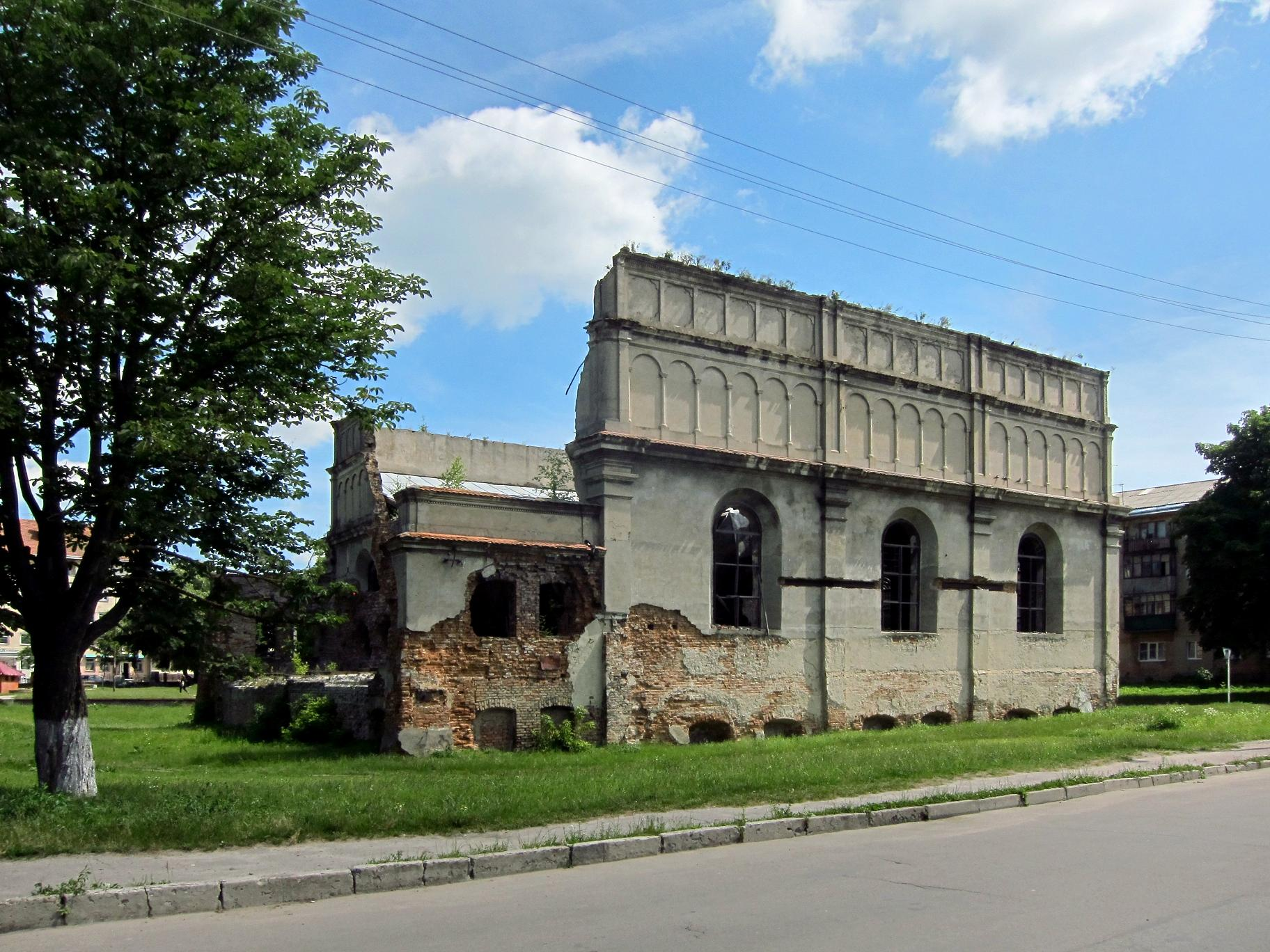 Синагога в Бродах.